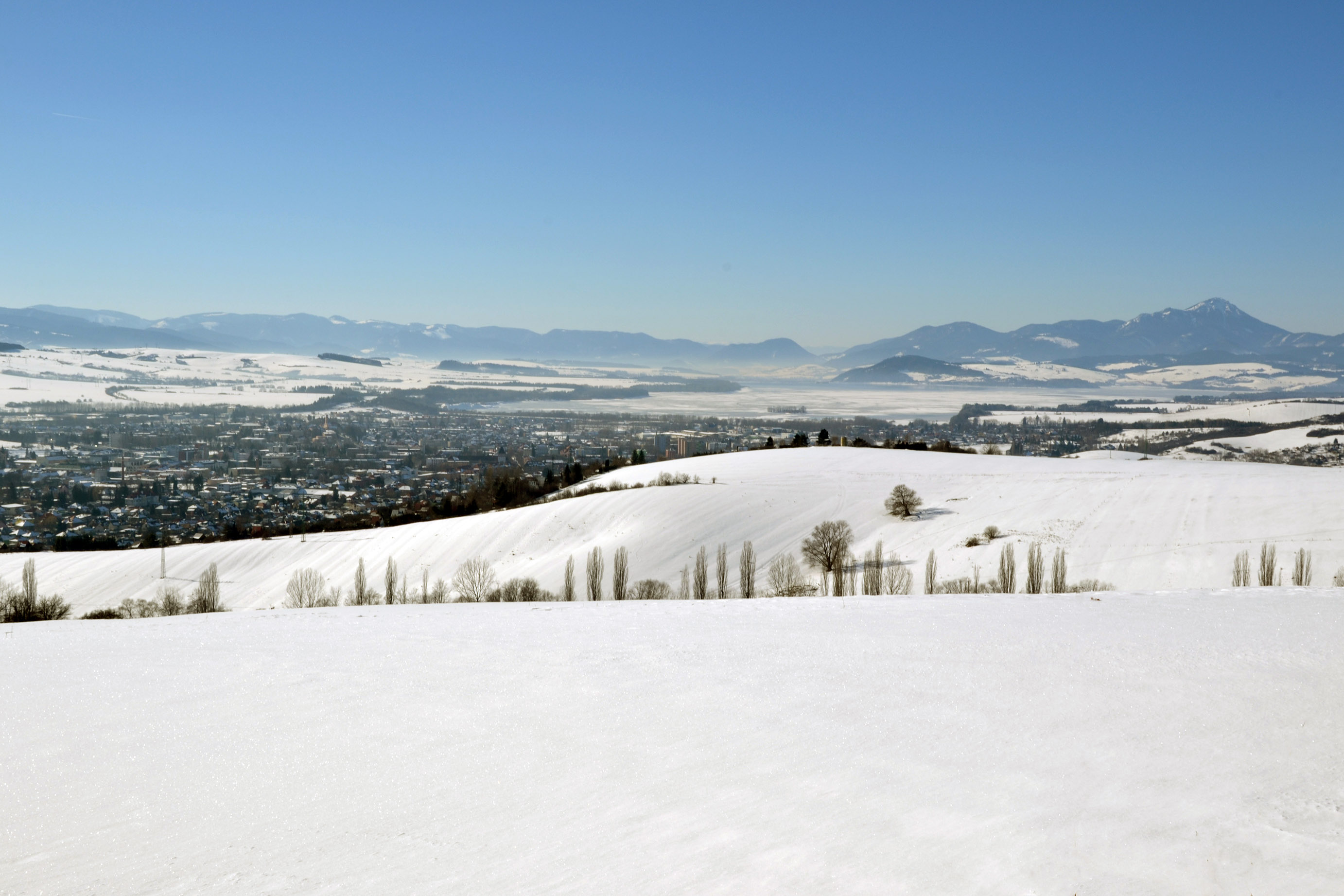 Liptovsky Mikulas